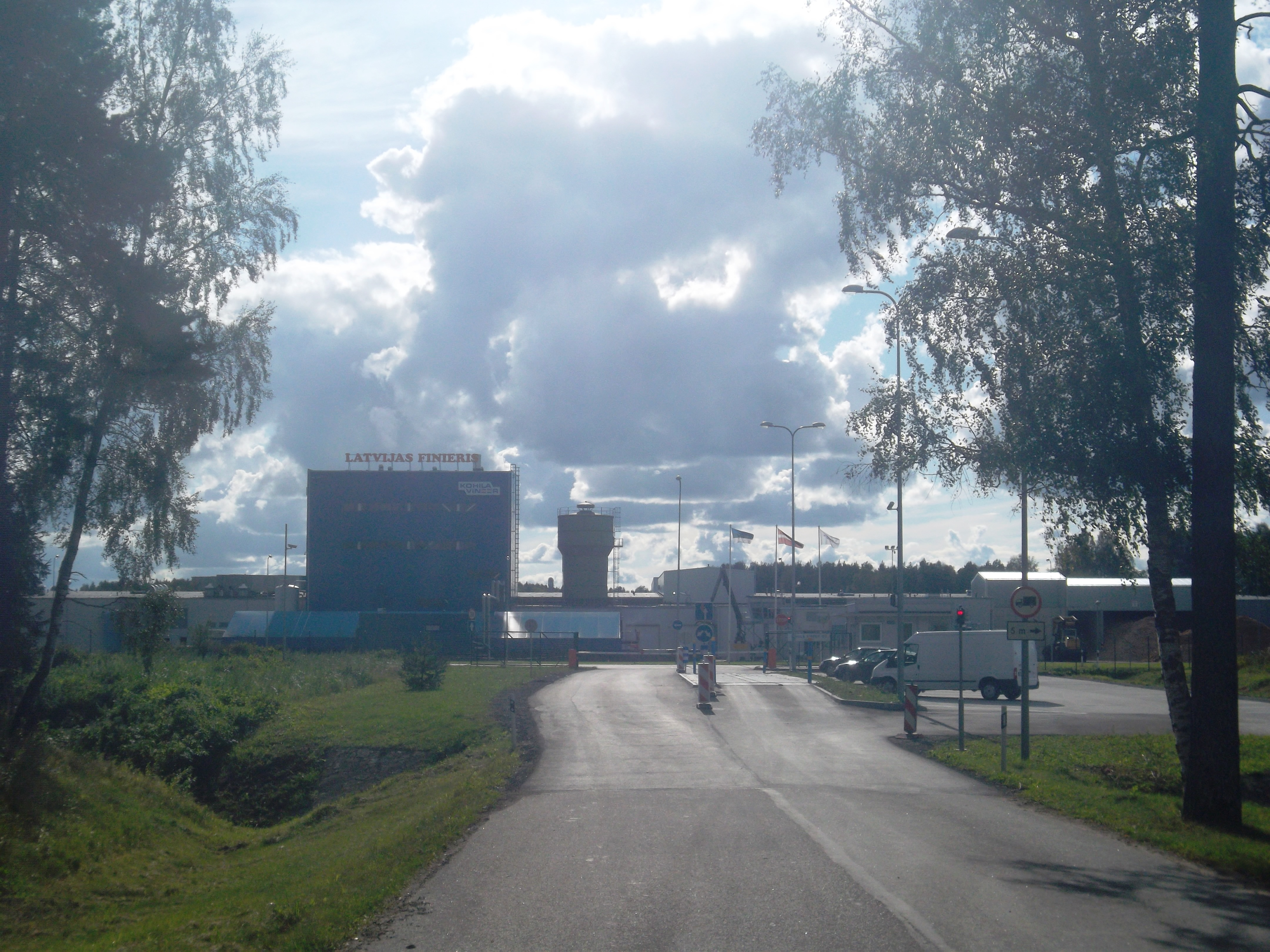 Кохила. Фанерный комбинат.